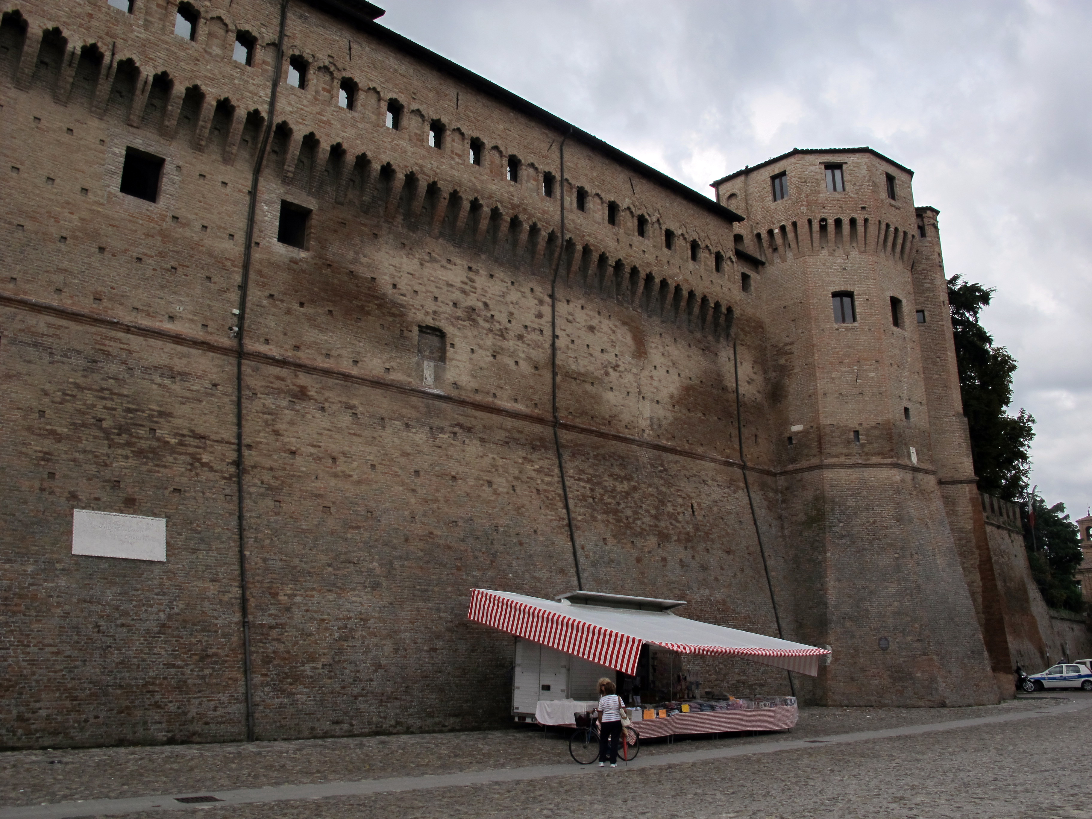 Rocca Malatestiana - MIBAC This is a photo of a monument which is part of cultural heritage of Italy.